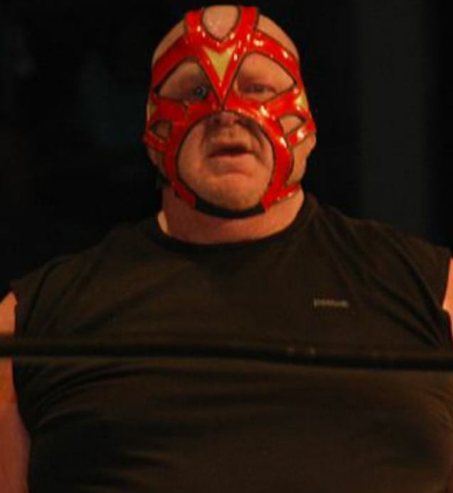 Vader sur un ring de catch en 2014.